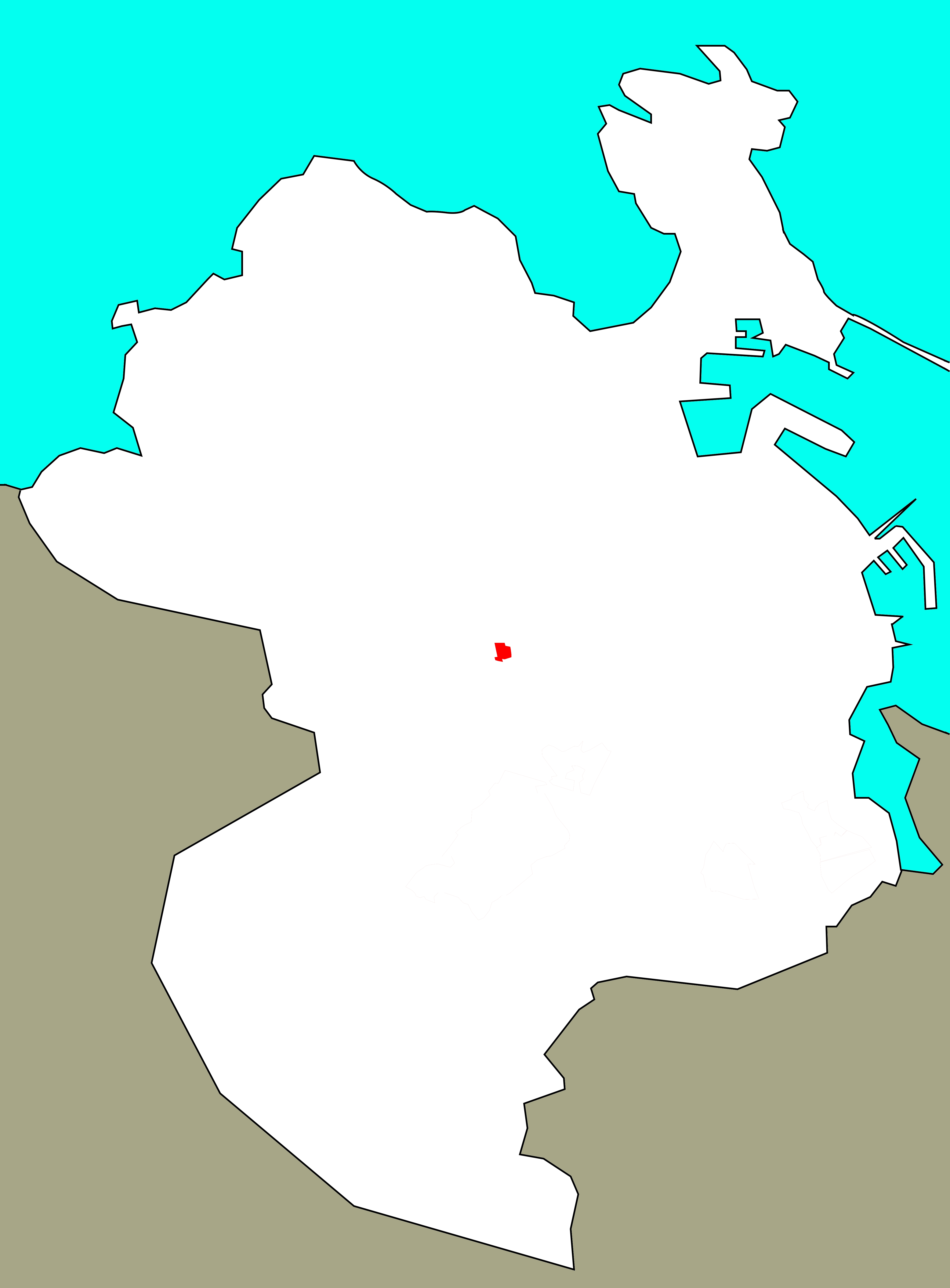 Situación do Bosque no concello da Coruña.[1]